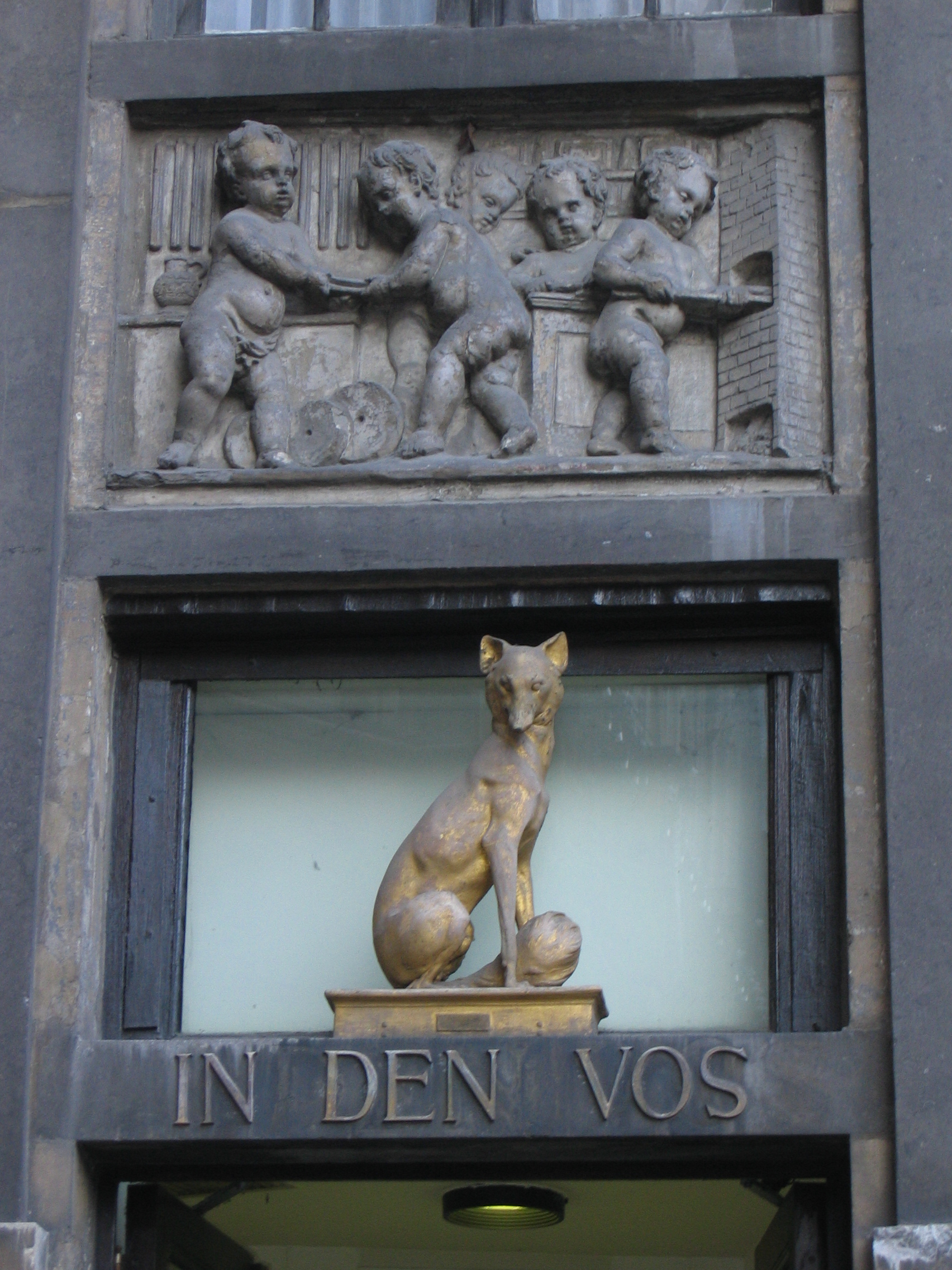 Enseigne de la maison Le Renard, Grand Place, Brussels